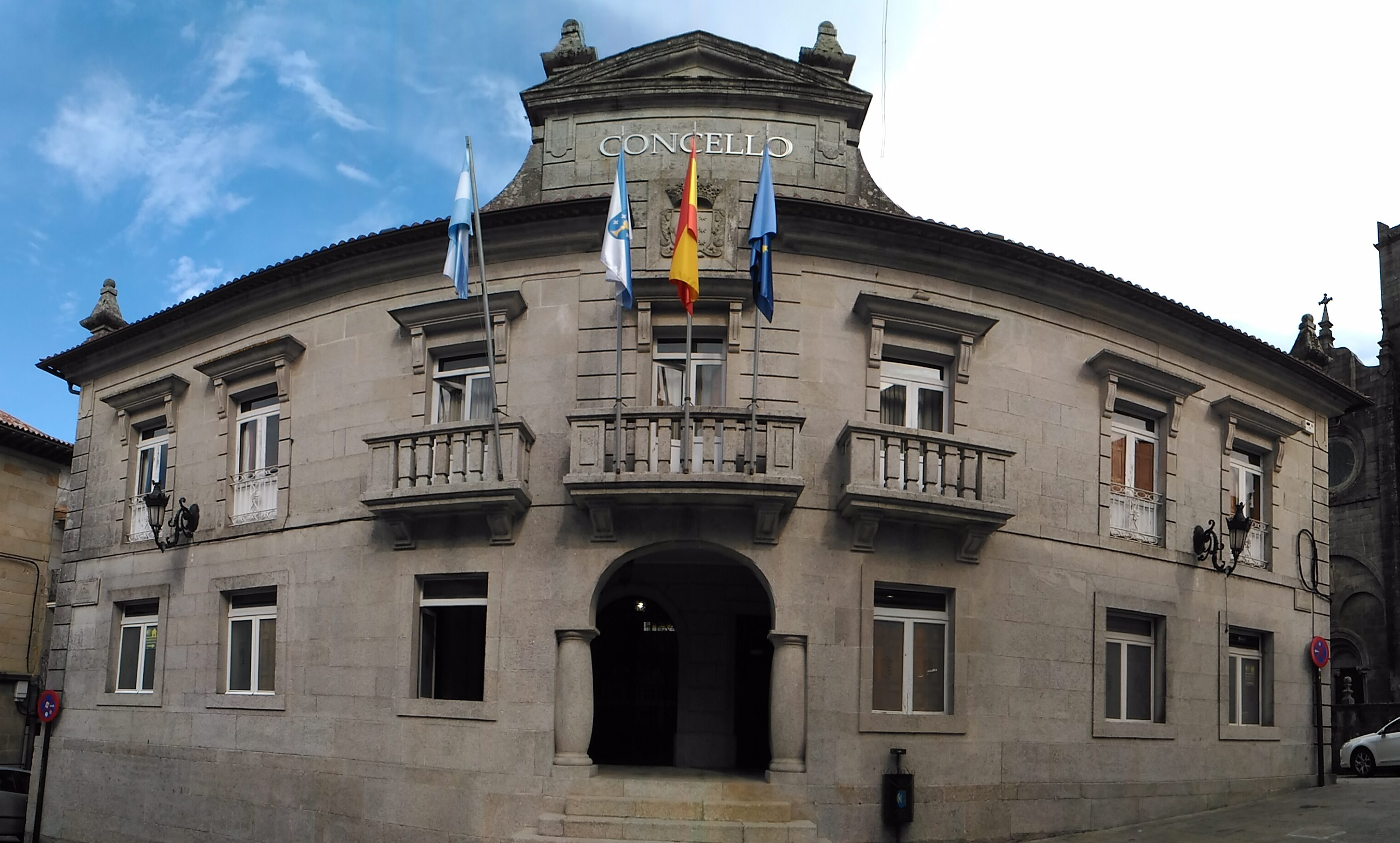 Casa do concello de Tui